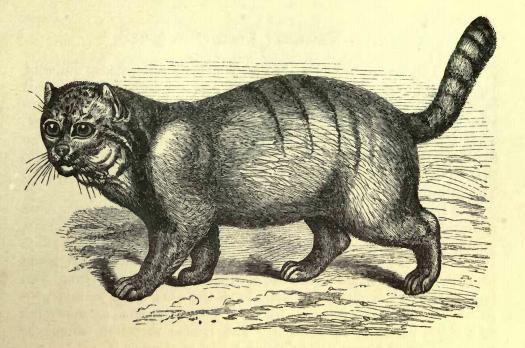 Felis manul